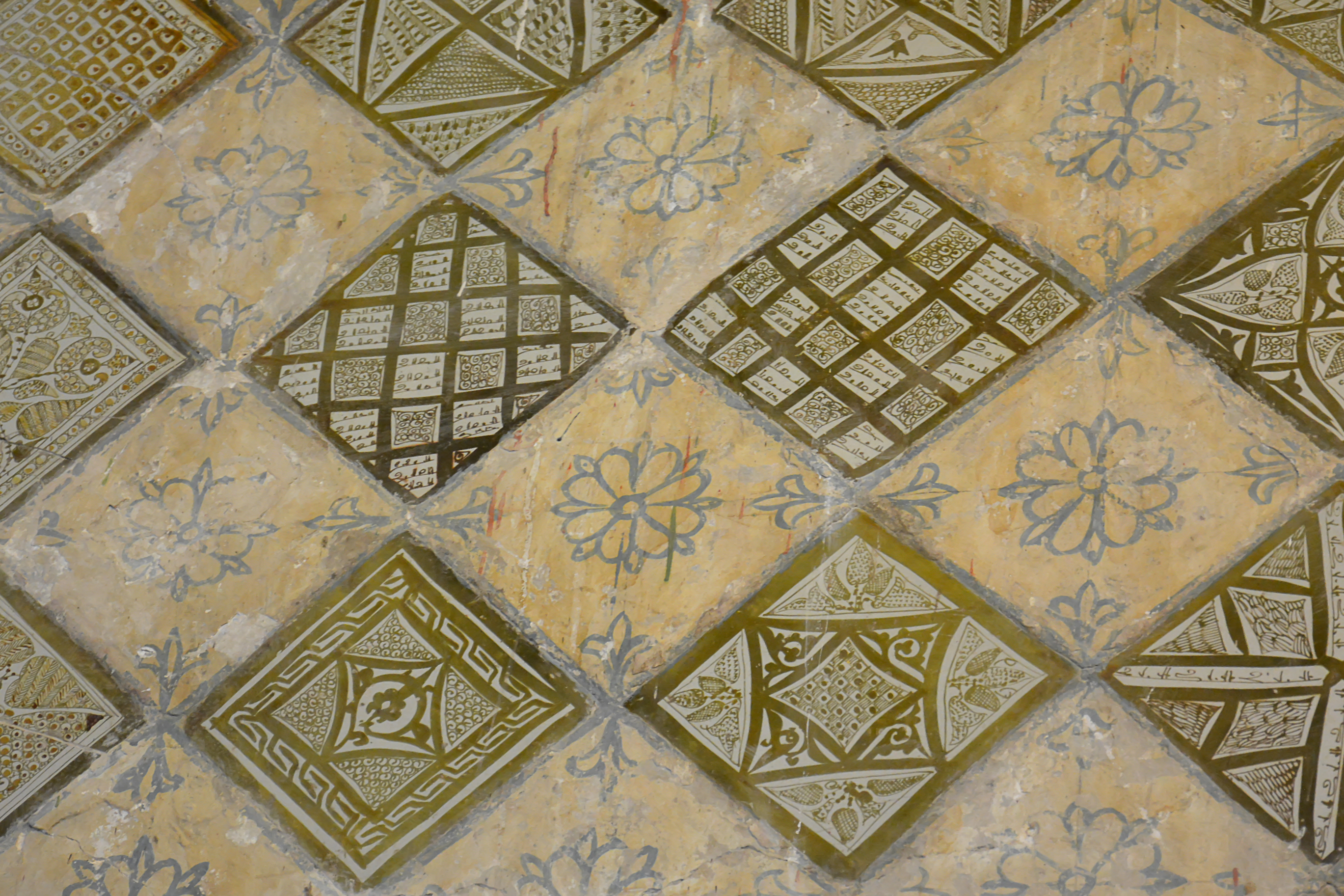 Grande Mosquée (Sidi Okba), détails du mihrab